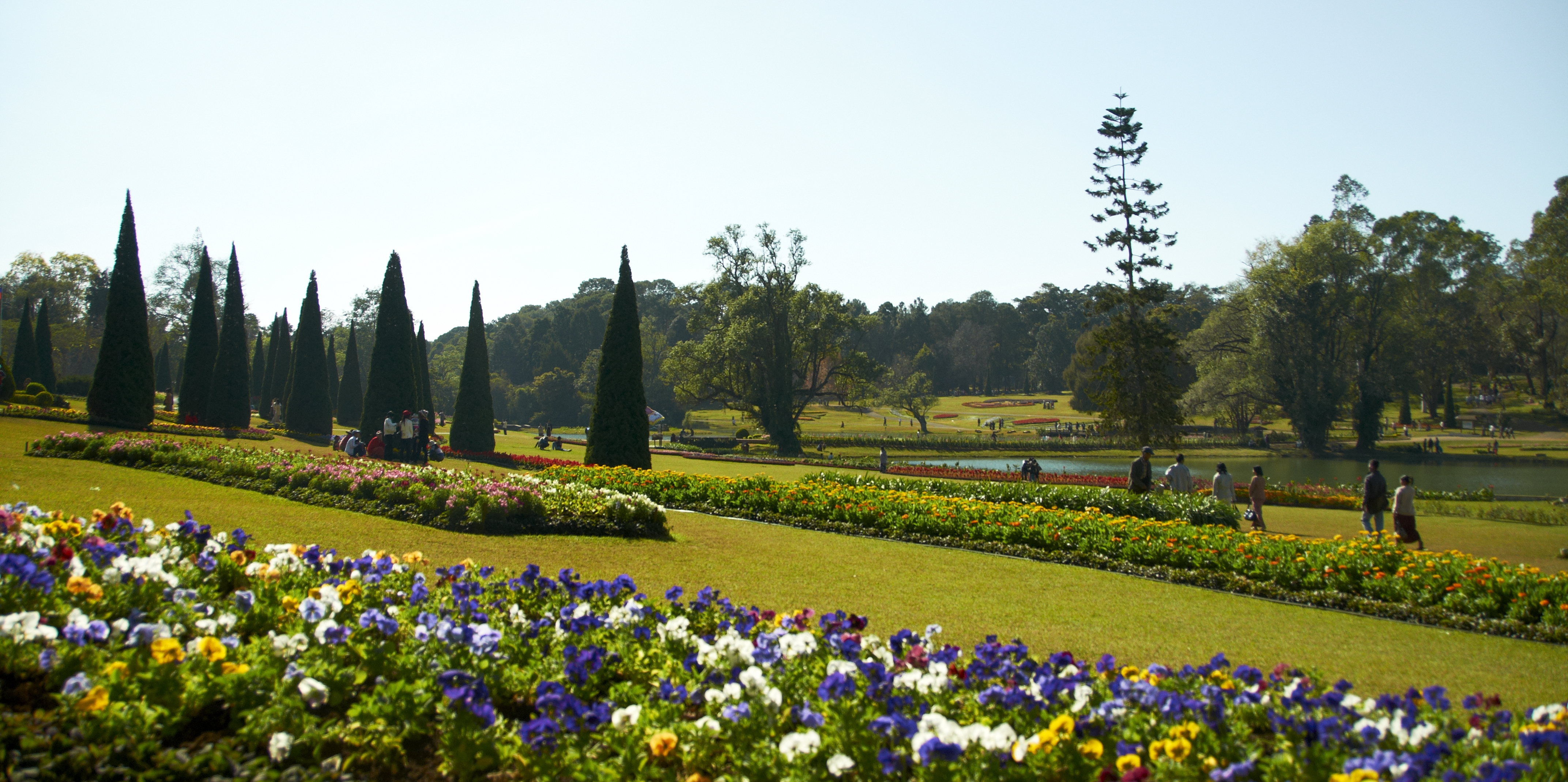 Pyin Oo Lwin, Myanmar (Burma)